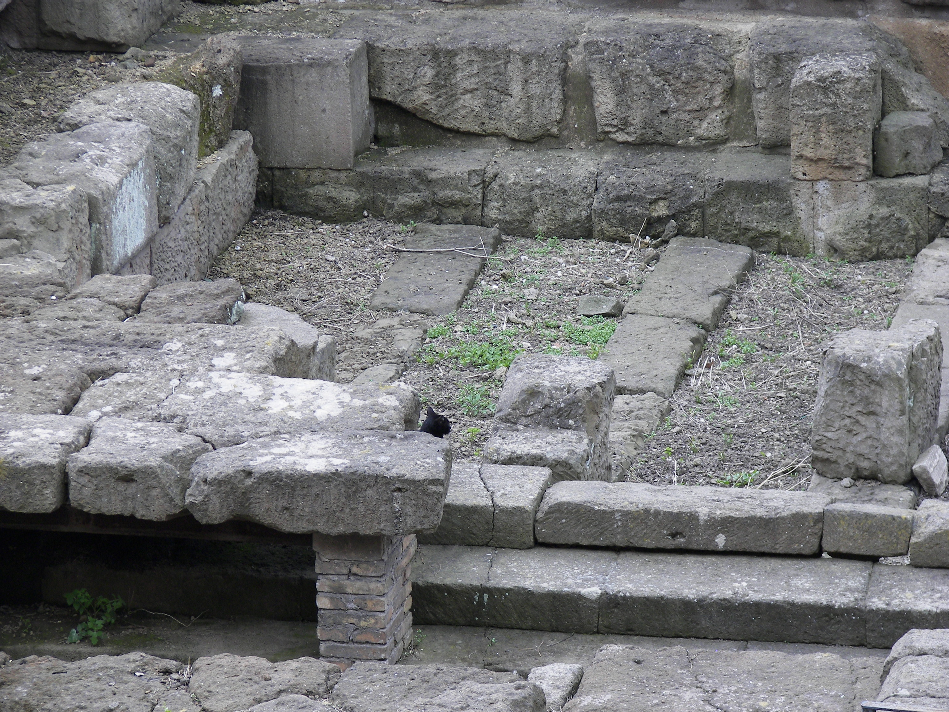 A cat near Temple C in Largo di Torre Argentina in Rome.